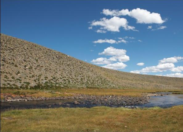 река Бох-Мөрөн-Гол